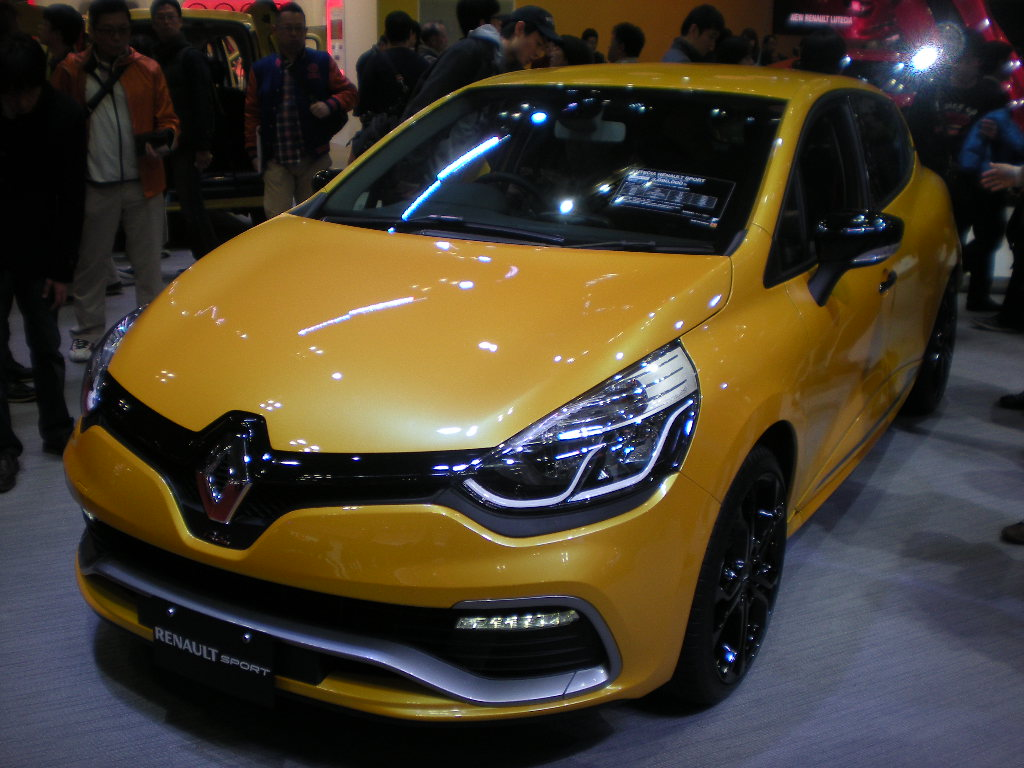 ルノー・クリオ